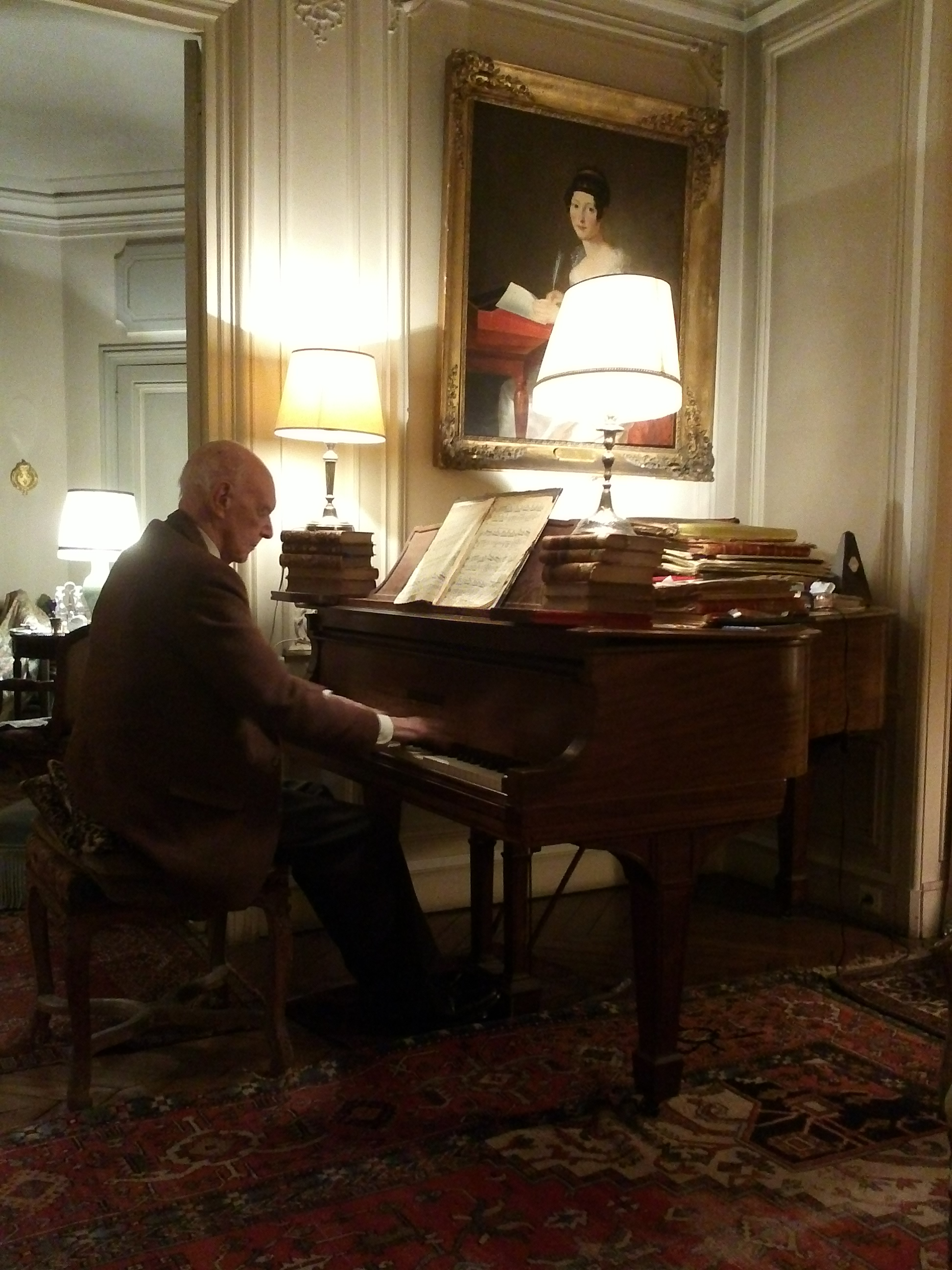 André Lavagne, compositeur français jouant au piano